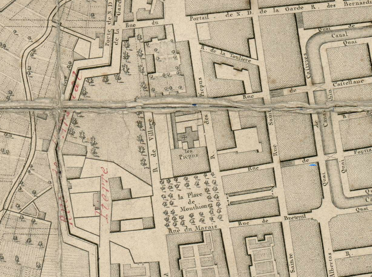 Zone sud de l'arsenal de Marseille en 1785. Emplacement hypothétique du cimetière de l'arsenal des galères.